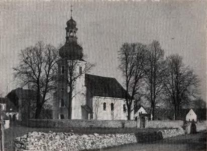 Kościół w Poznowicach